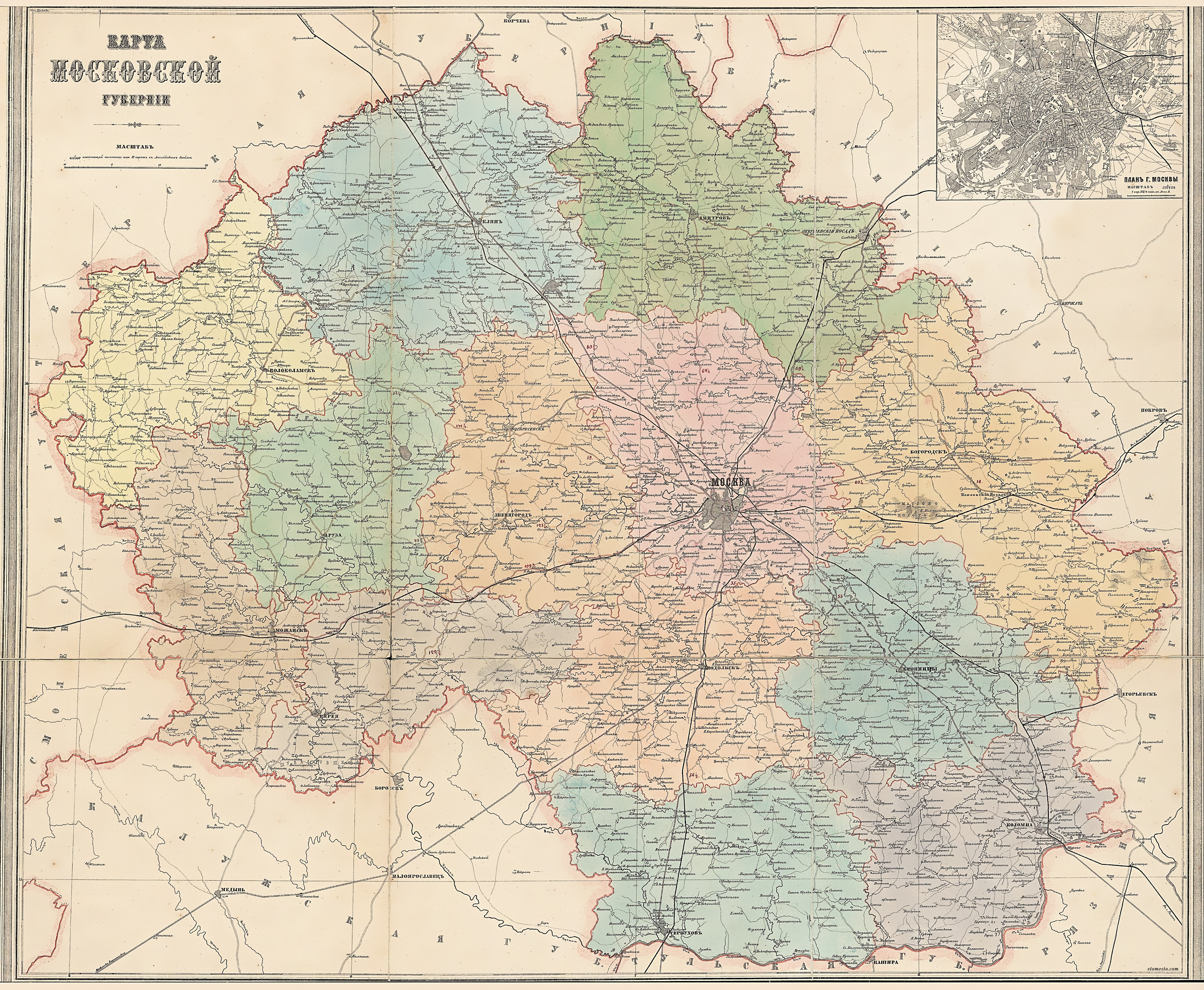 Карта Московской губернии Тодта 1873 года